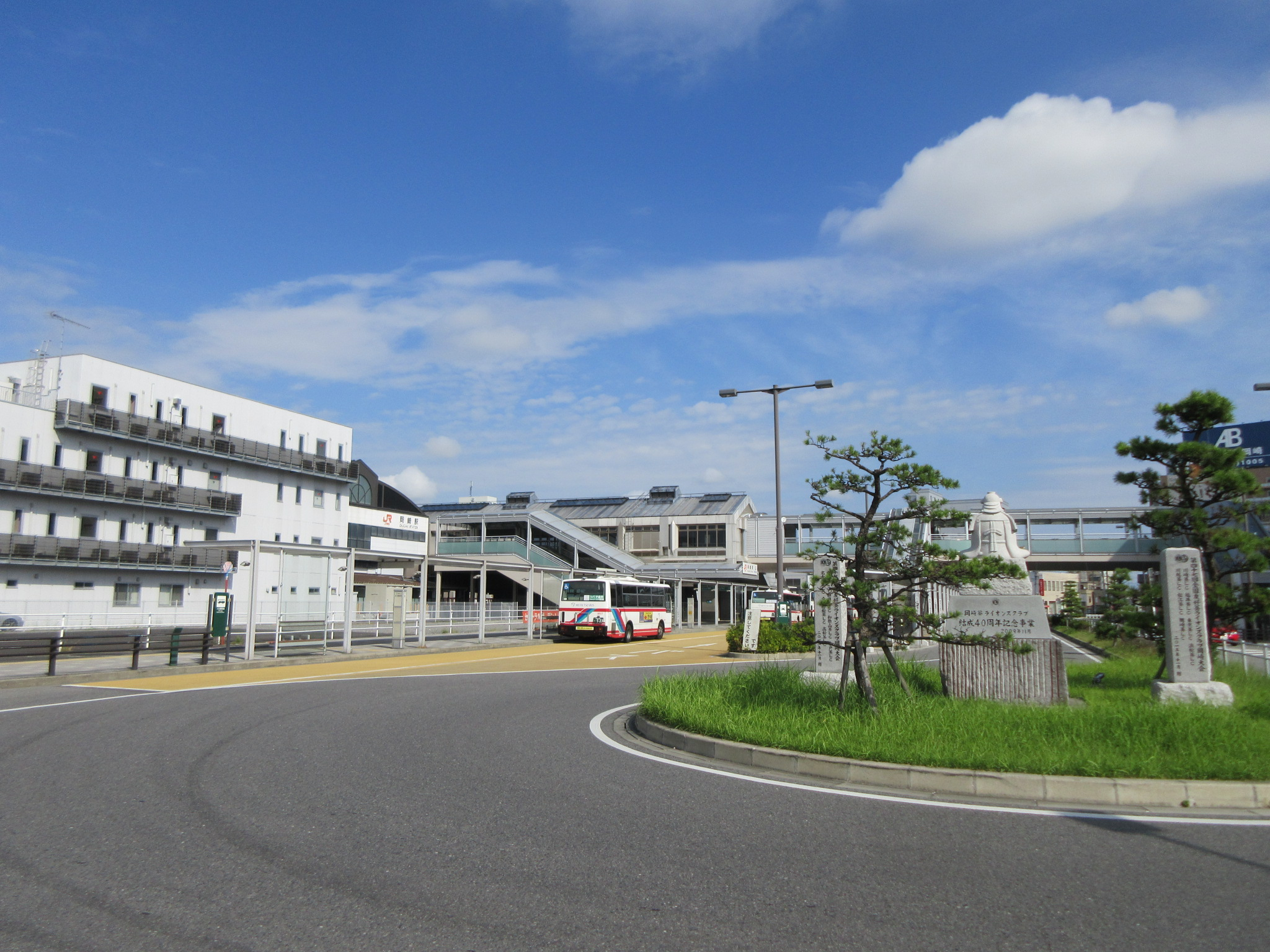 JR岡崎駅、東口